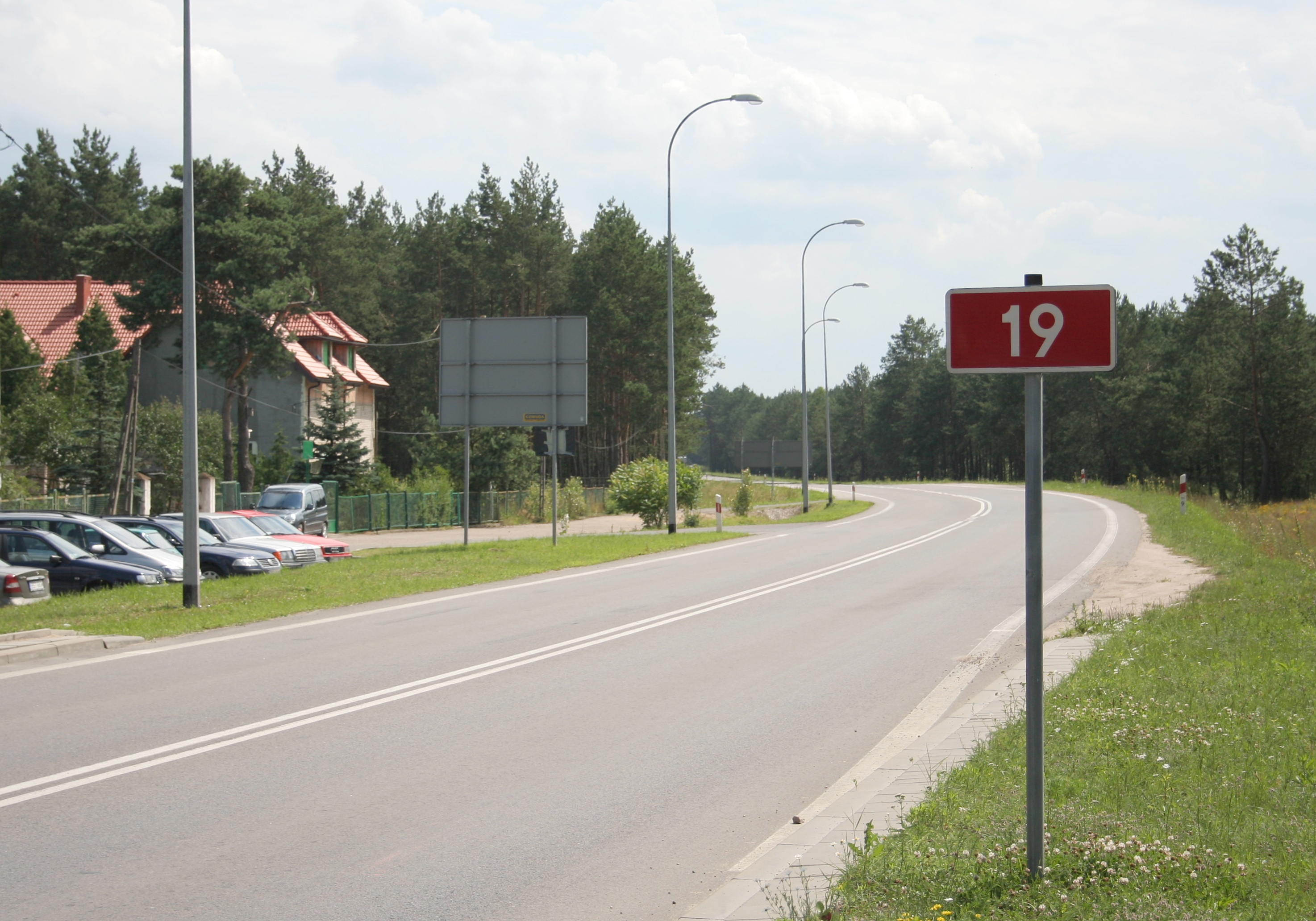 Droga krajowa nr 19 w Siemiatyczach – wylot w stronę Miedzyrzeca Podlaskiego.